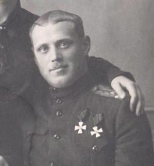 Σεργκέι Αβντέεφ